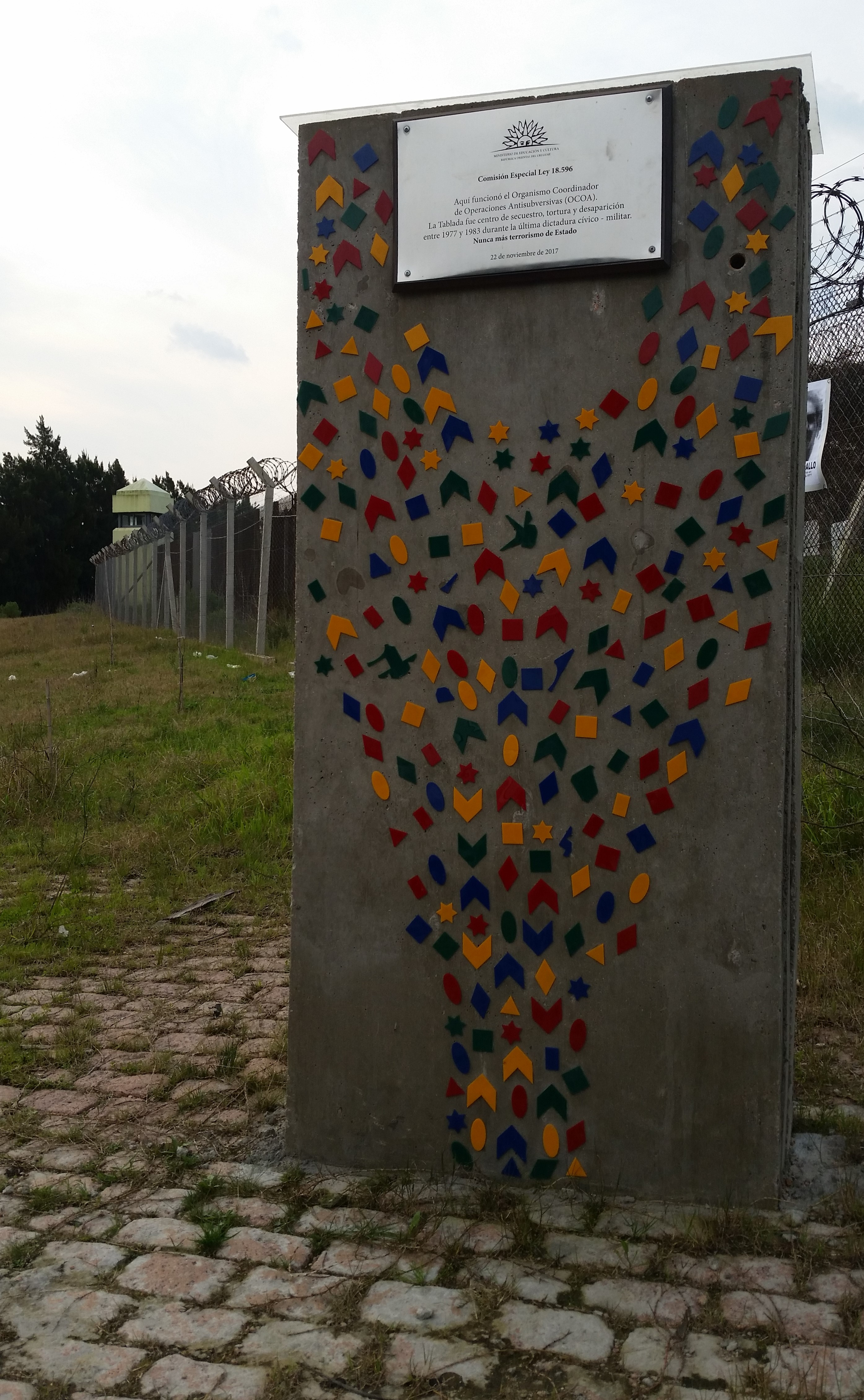 Texto placa: «Aquí funcionó el Organismo Coordinador de Operaciones Antisubversivas (OCOA). La Tablada fue centro de secuestro, tortura y desaparición entre 1977 y 1983 durante la última dictadura cívico - militar. Nunca más terrorismo de Estado. 22 de noviembre de 2017»